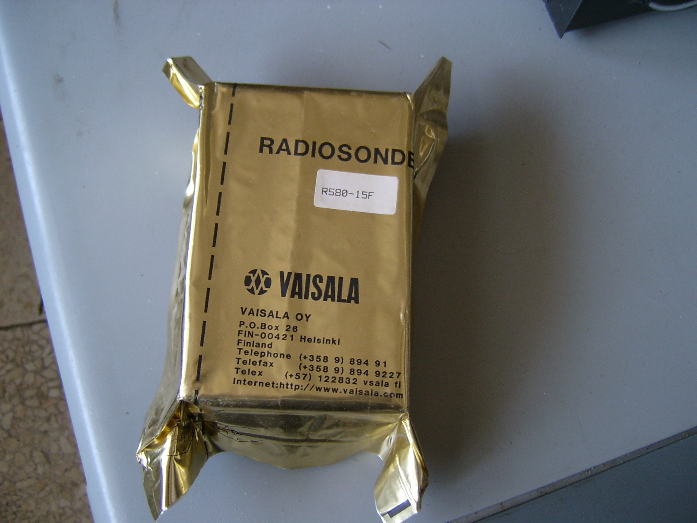 یک بسته بندی حاوی رادیوسوند مدل قدیمی دهه ۸۰ میلادی